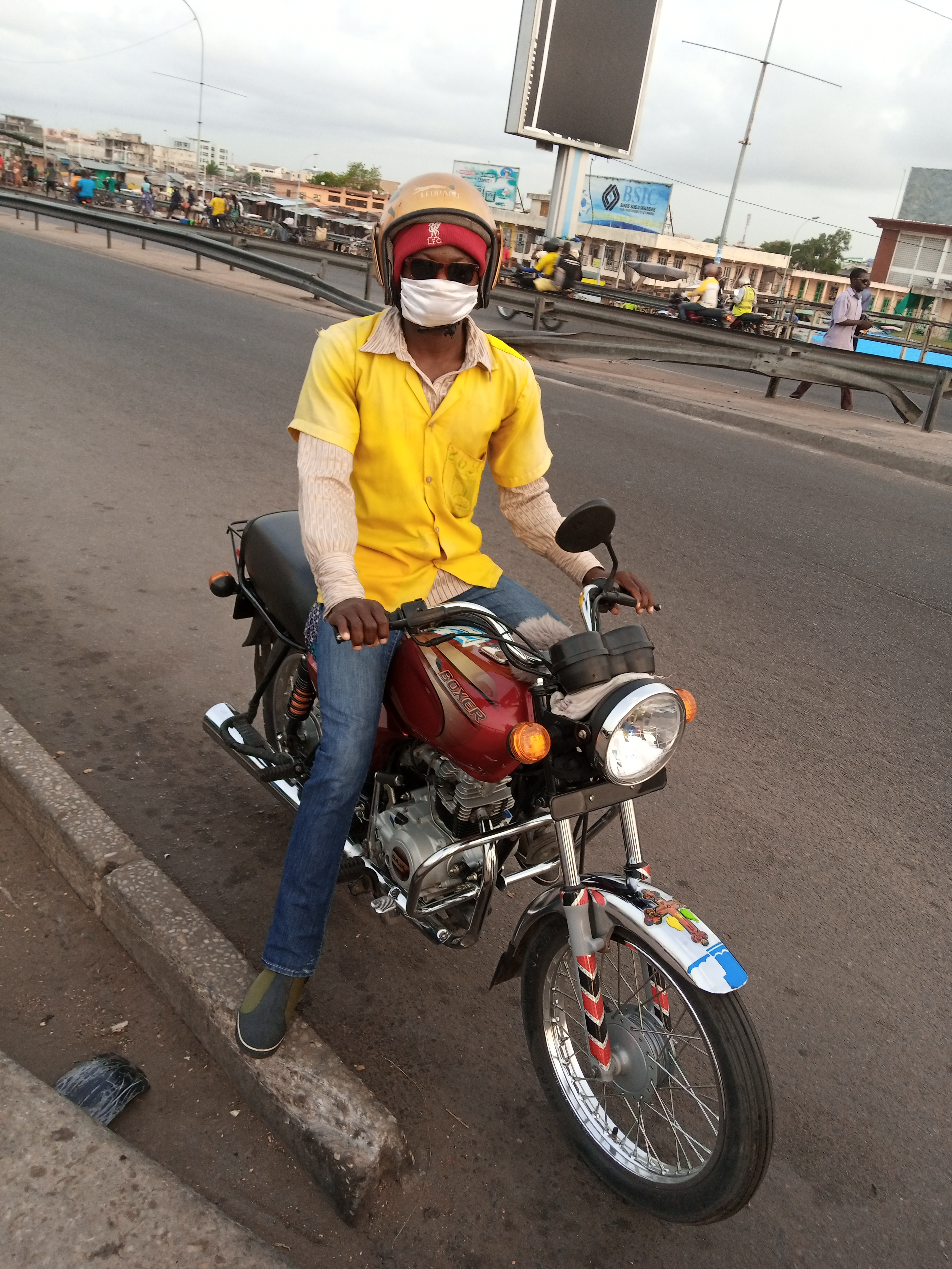 le transport à Cotonou au Bénin This is an image with the theme "Africa on the Move or Transport" from: Benin